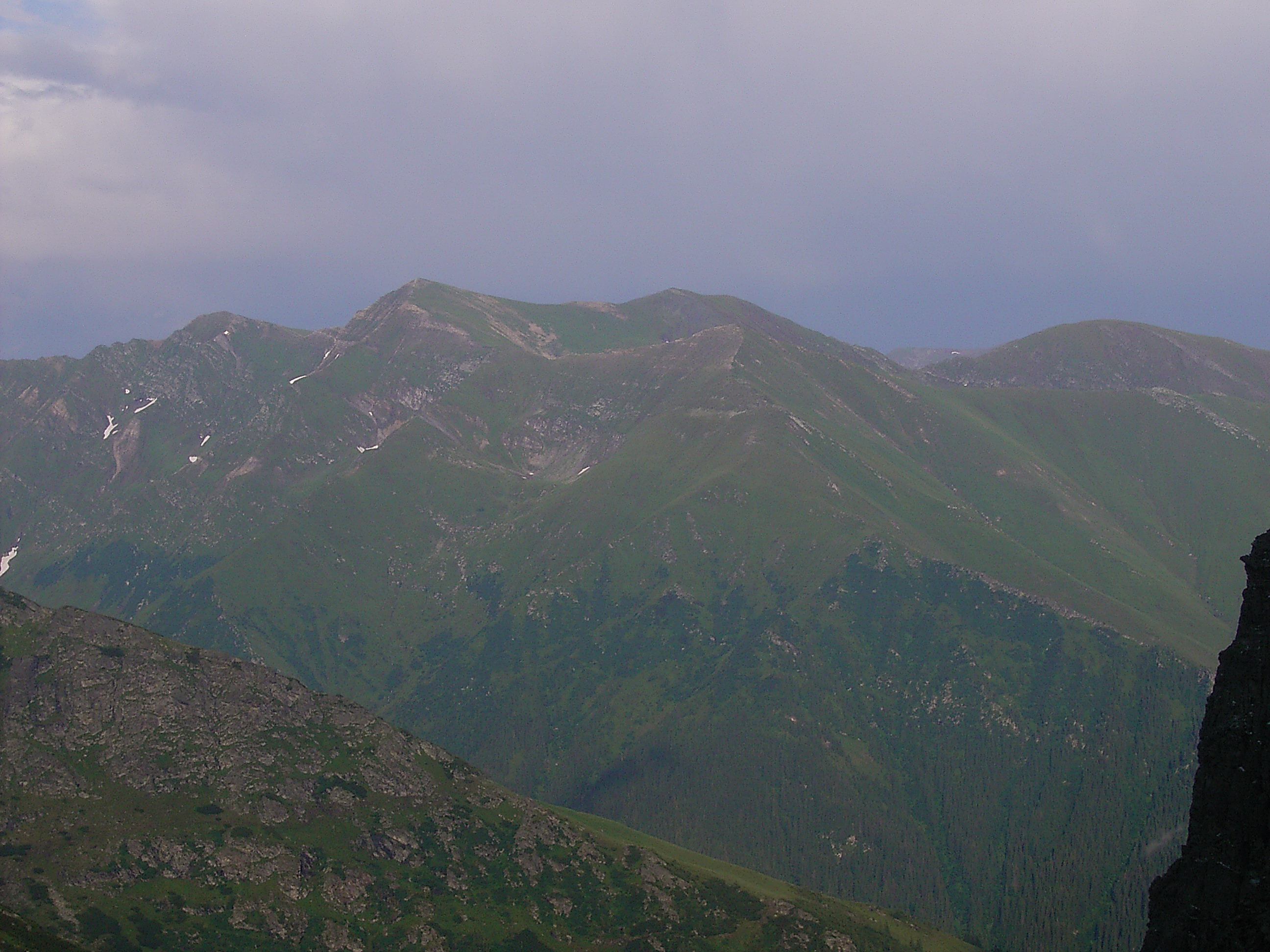 Vârfurile Muşeteica şi Robiţa